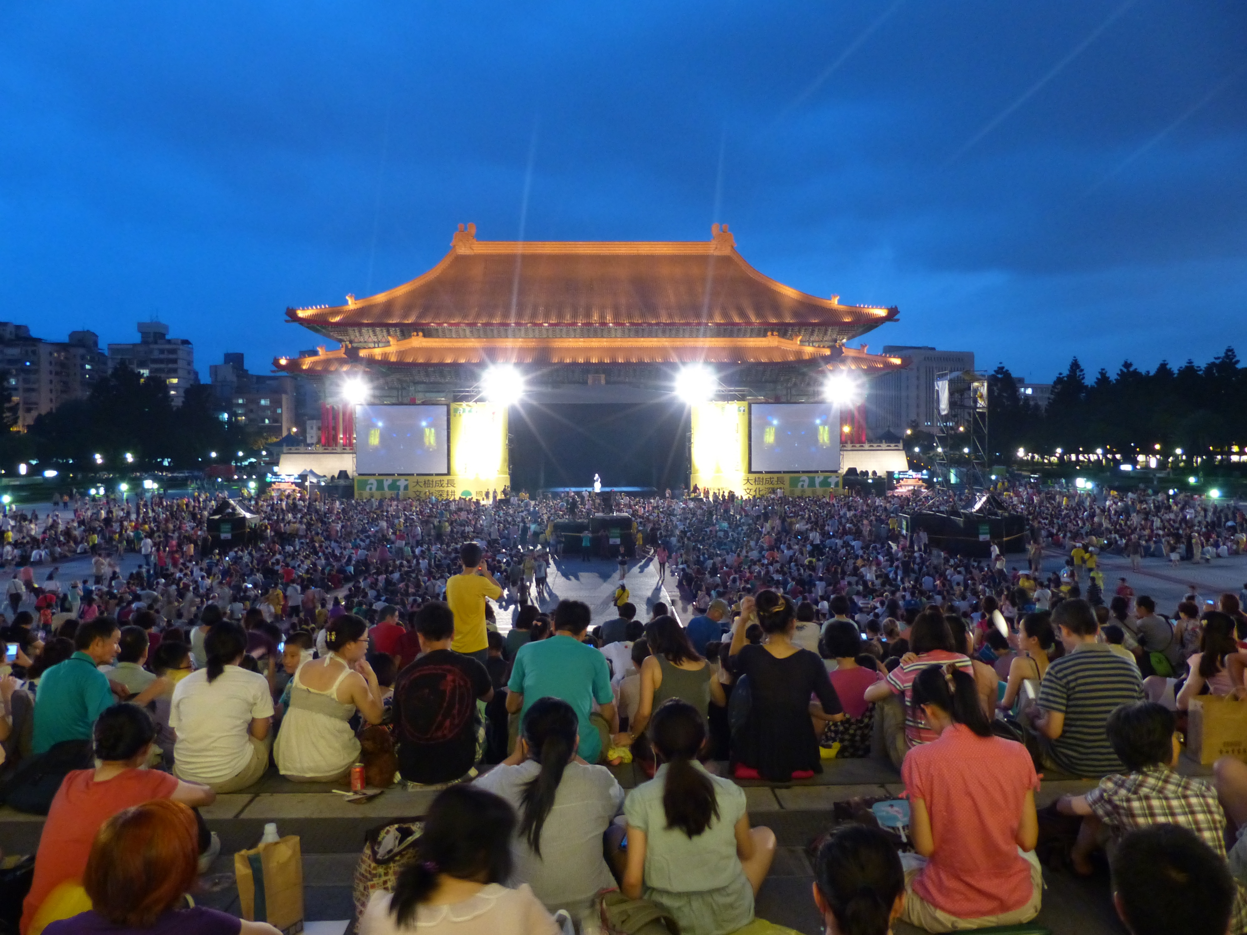 從國家音樂廳露臺南望國家戲劇院前的雲門公演舞臺。